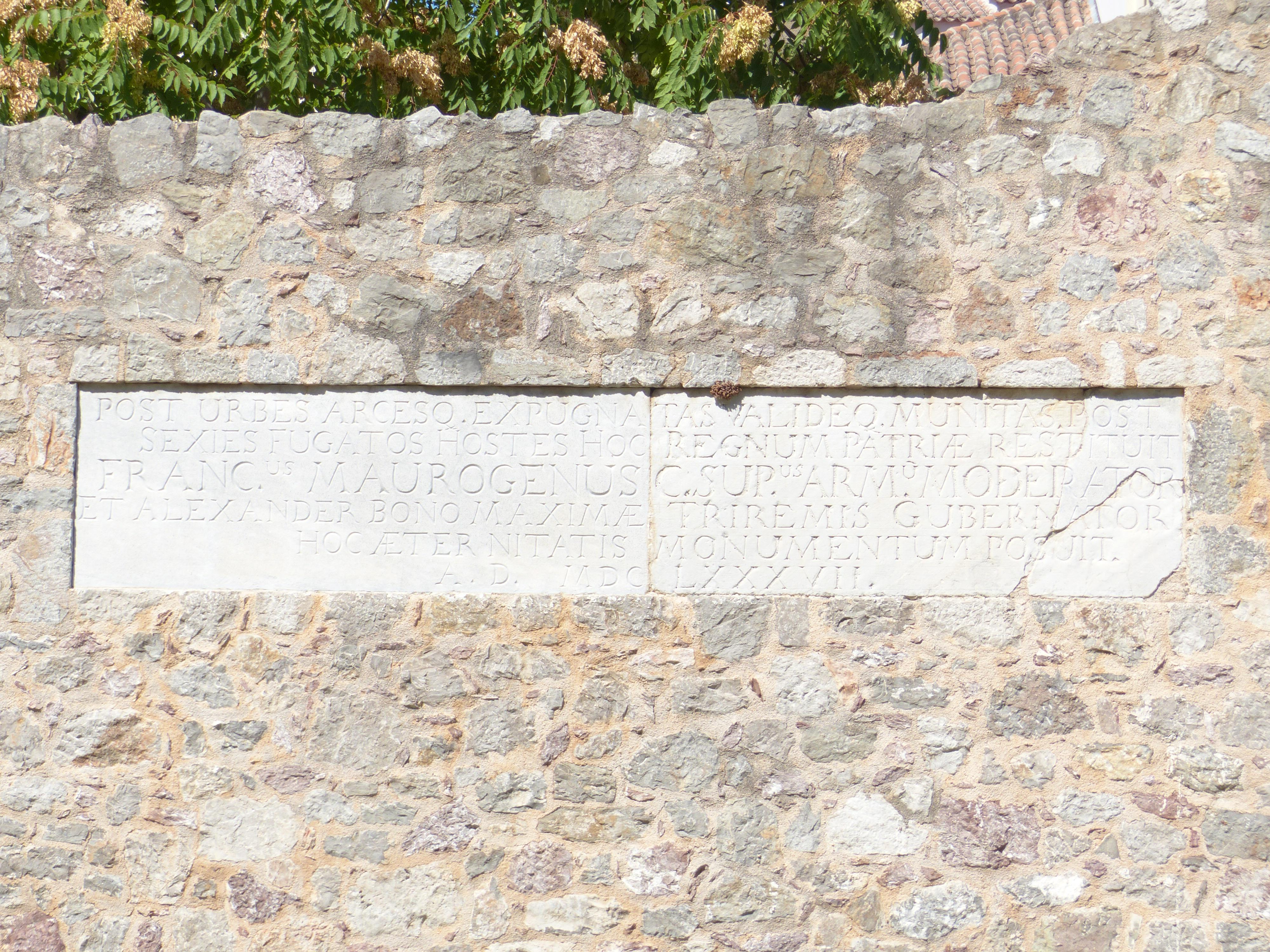 Nauplie (Grèce). Inscription latine de 1687 insérée dans le mur à gauche de la porte vénitienne restaurée donnant accès à la vieille ville (Πύλη της Ξηράς). L'inscription mentionne, sous le nom latin de Franciscus Maurogenus, le général vénitiien Francesco Morosini qui venait de reprendre la ville et avait entrepris de gros travaux de fortifications.